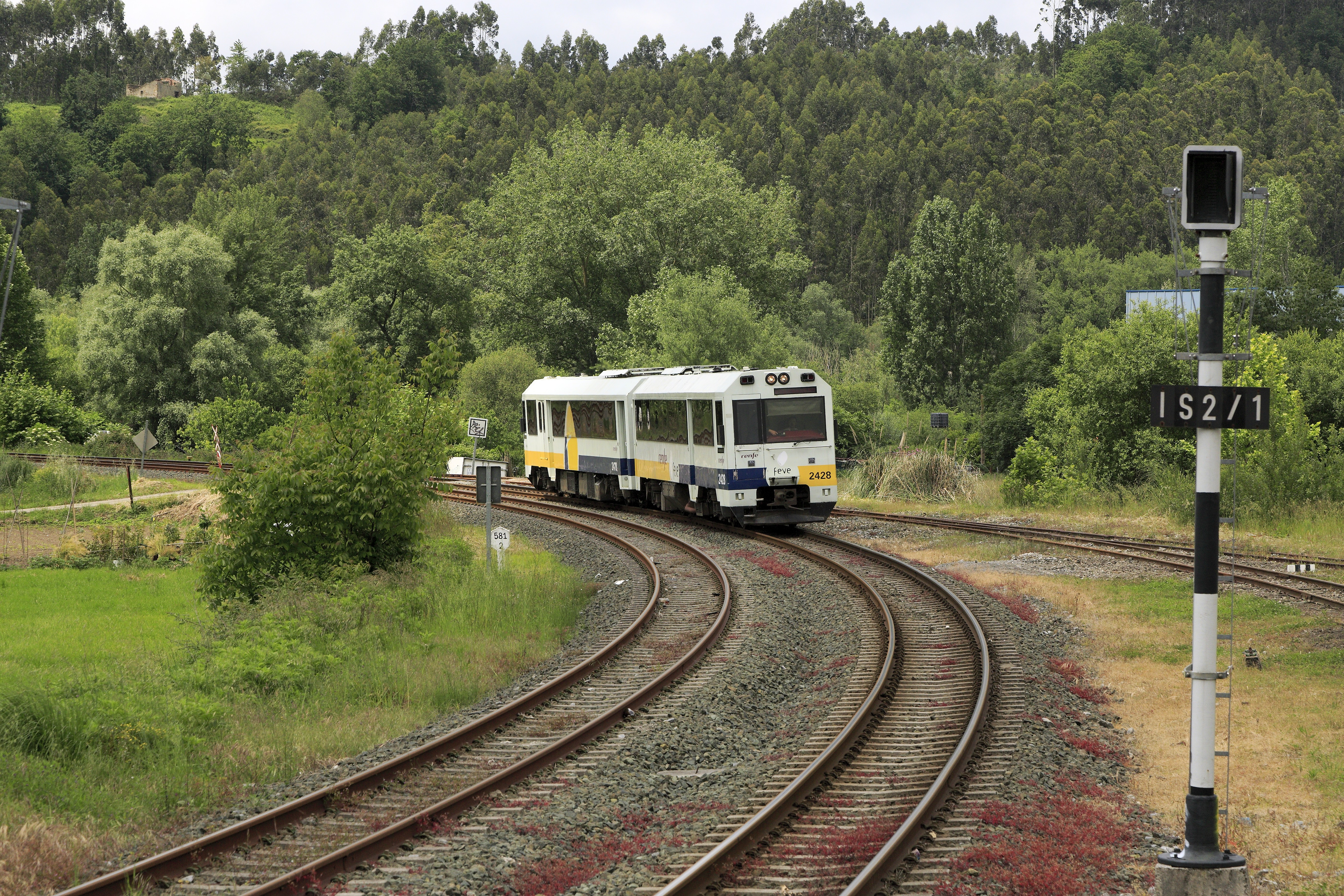 einfahrend von Santander zur Rückfahrt dorthin. Auf dem Abschnitt Marrón–Aranguren bestand zum Aufnahmezeitpunkt Schienenersatzverkehr.